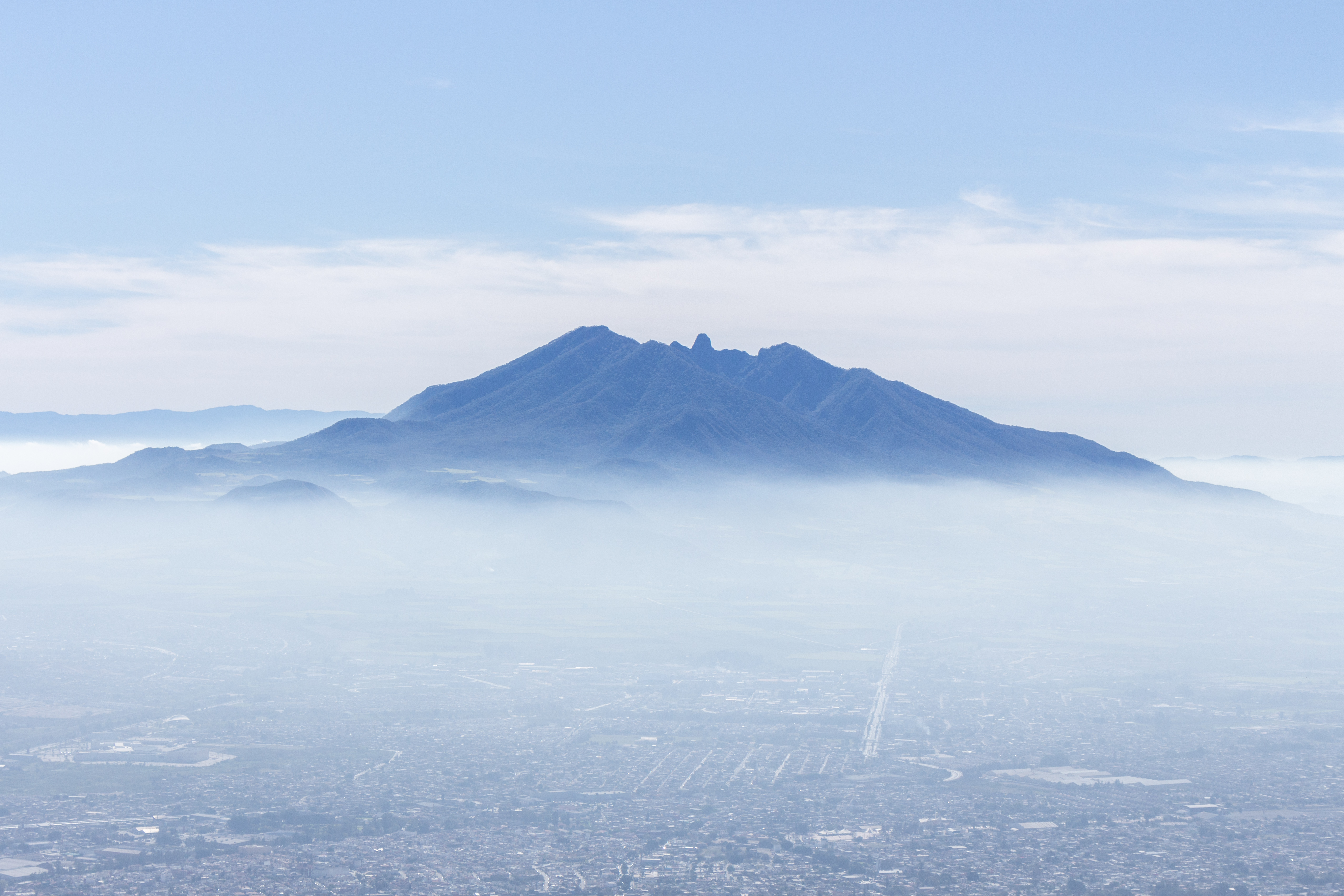 Toma del Cerro Sanganguey ubicado al sureste de la ciudad mexicana de Tepic en el estado de Nayarit.